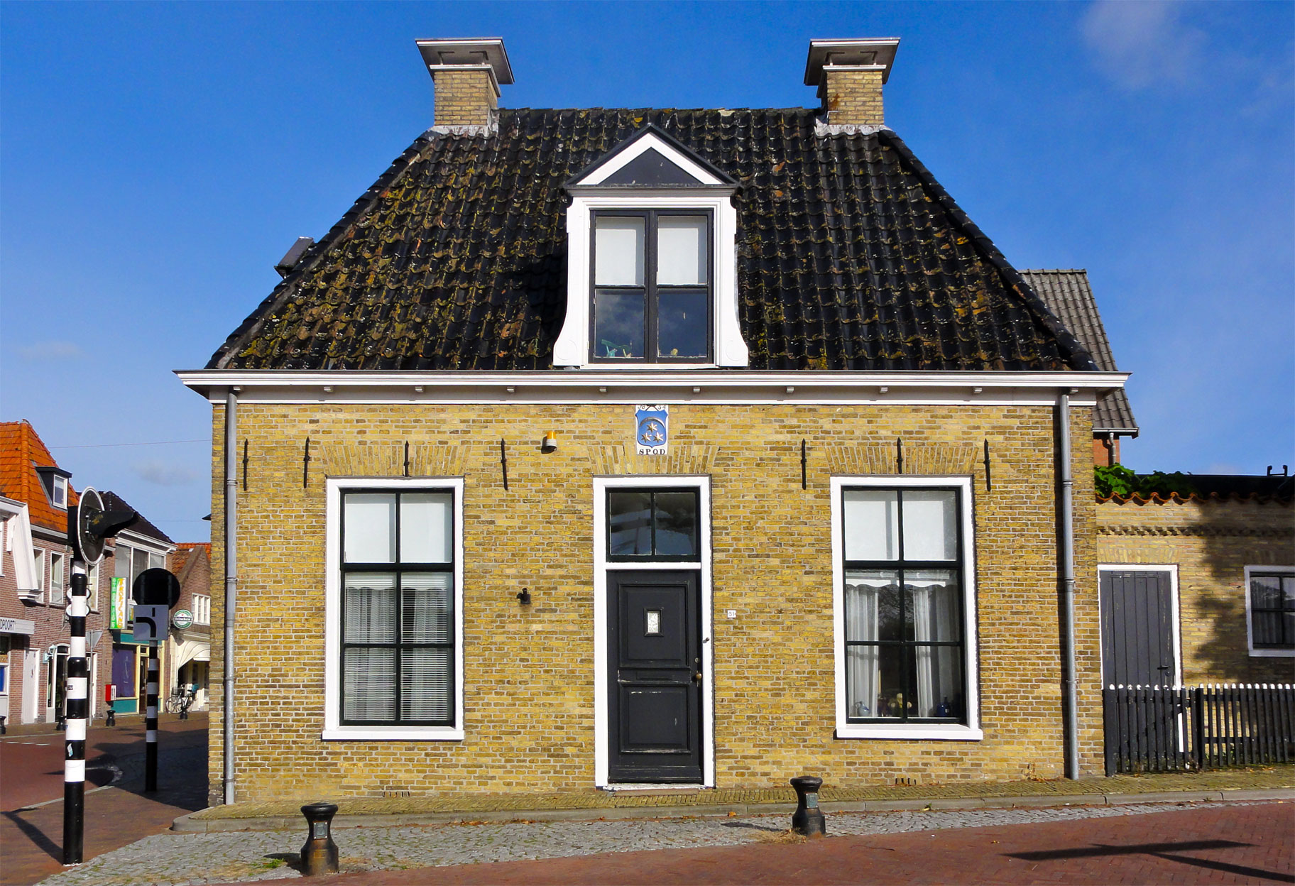 Zuiderbolwerk 51 Dokkum, rijksmonument